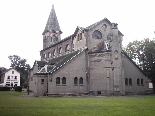 L'église.